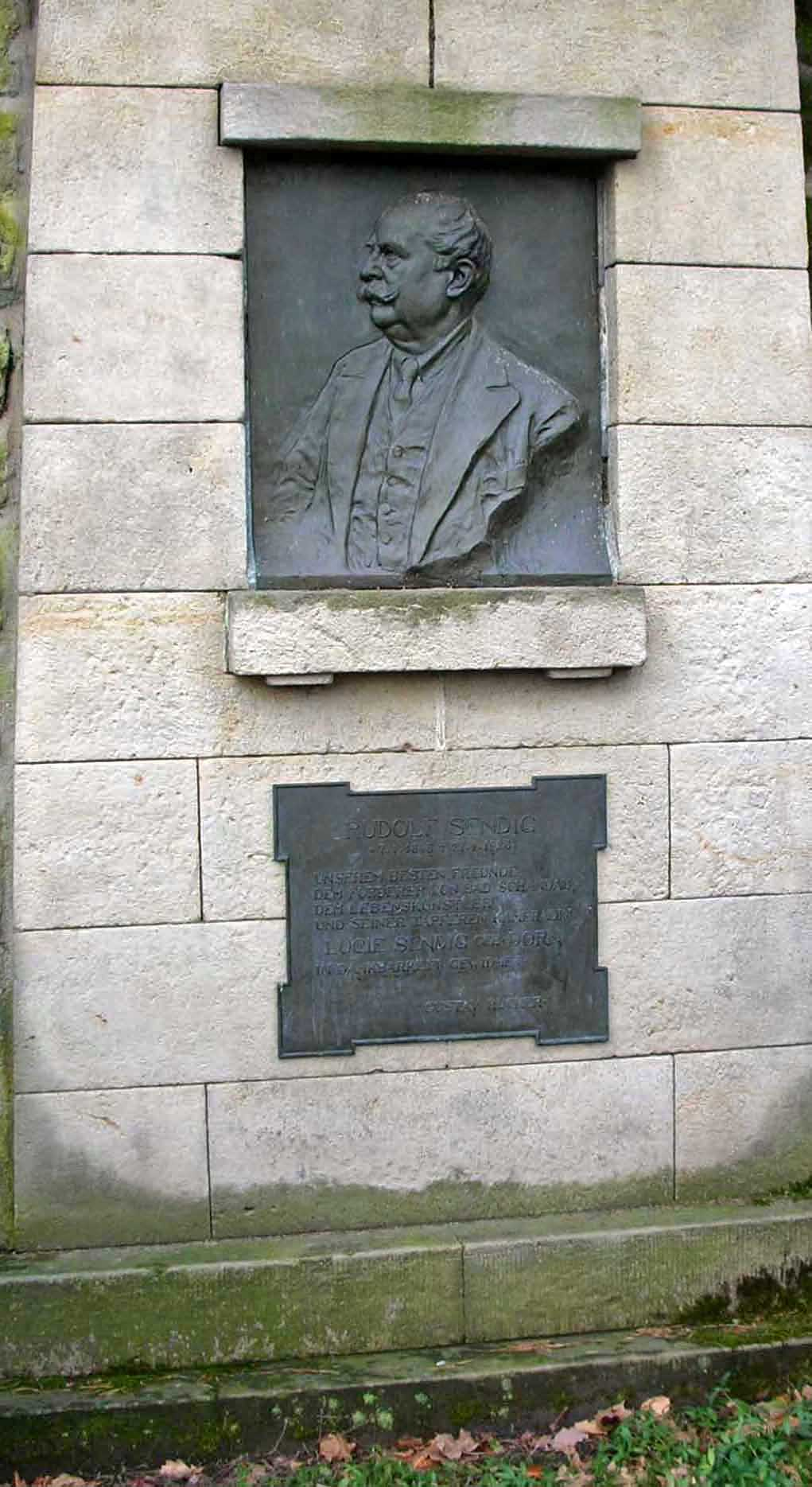 Gedenkstein für Rudolf Sendig bei Bad Schandau